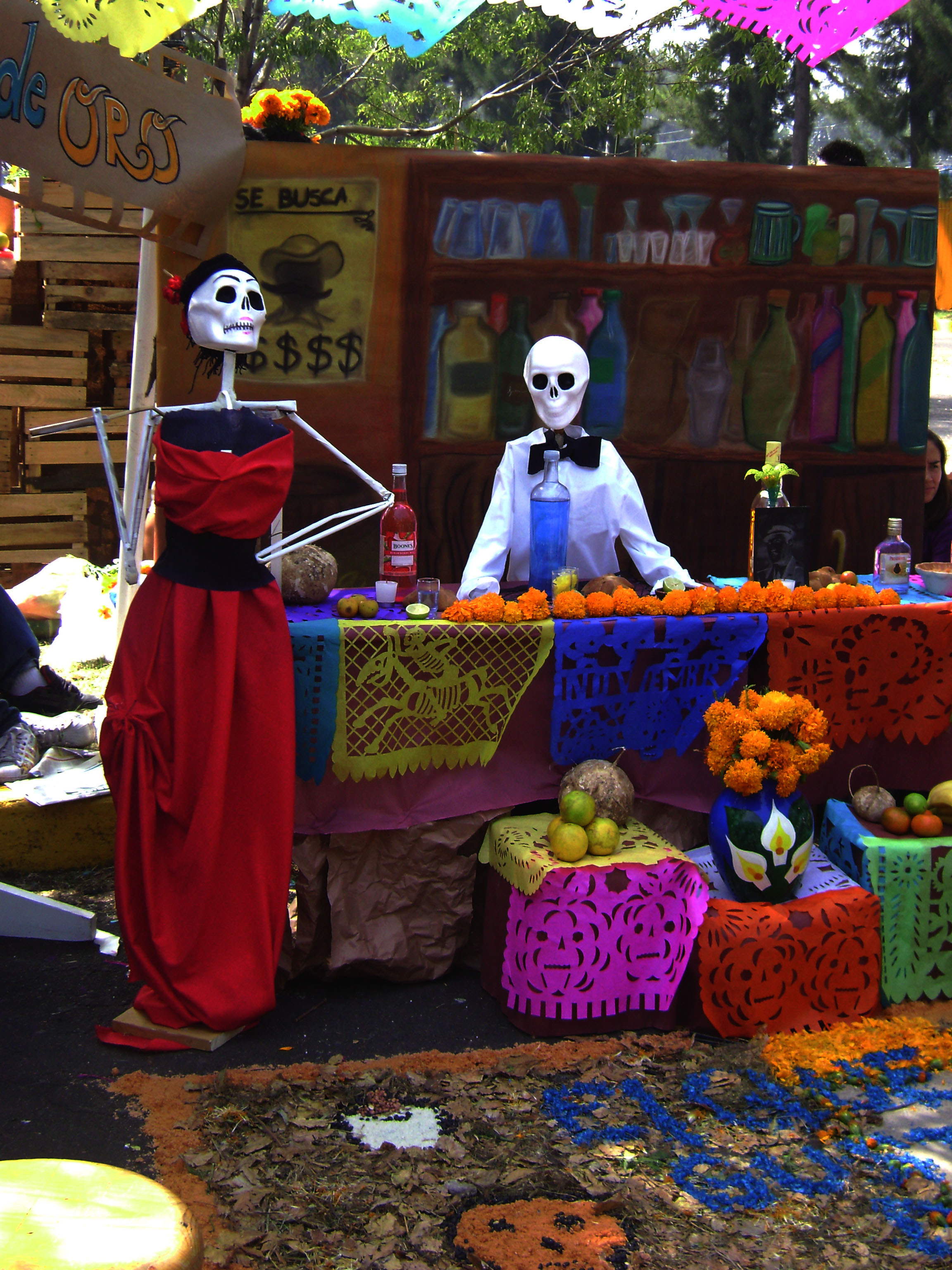 Día de Muertos Estilo Wiki